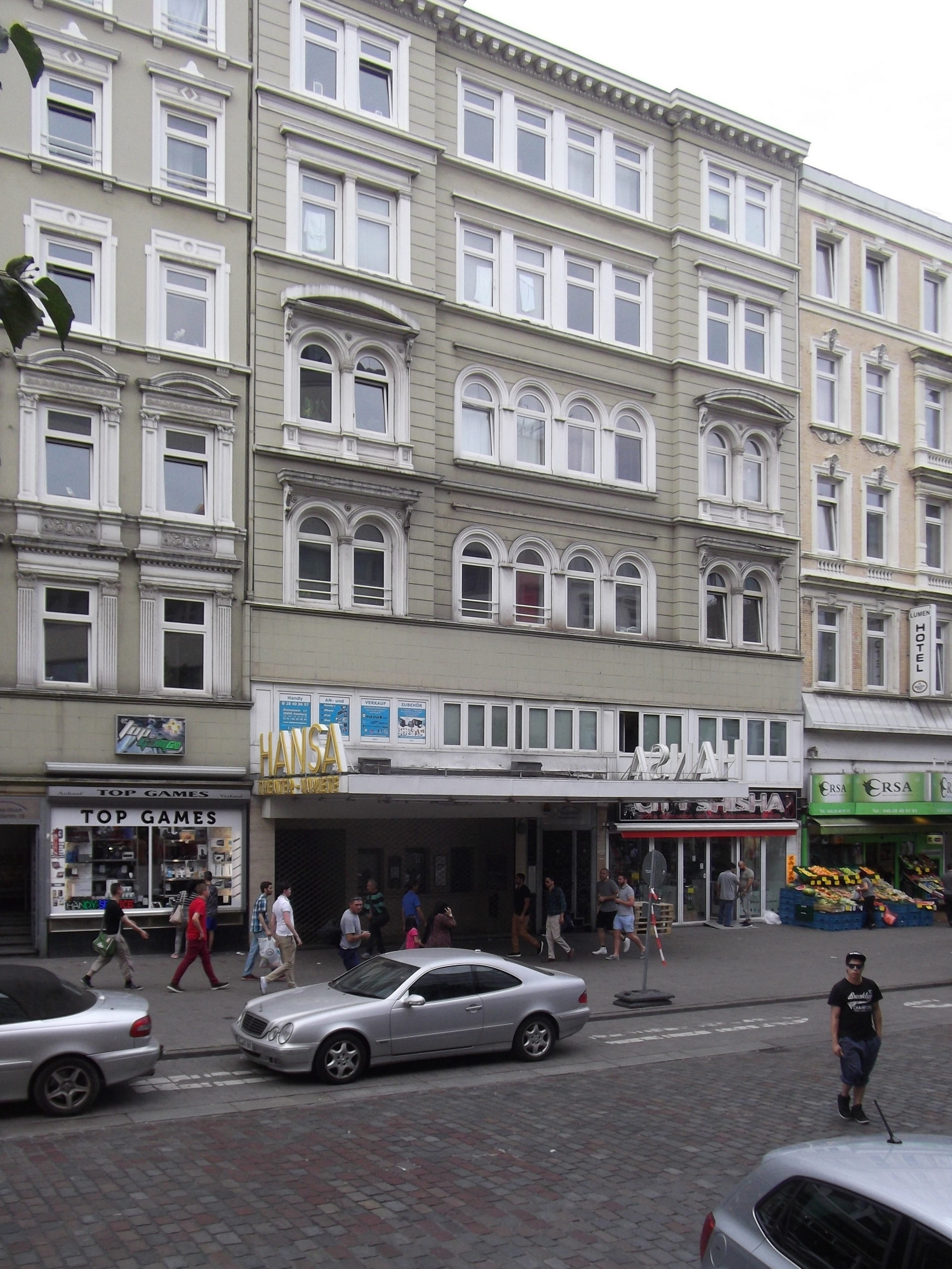 Hamburg, August 2015